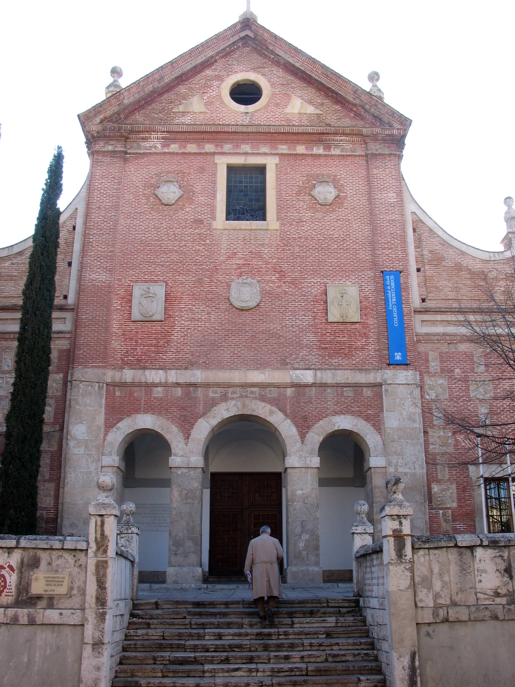 Fachada del Colegio de los Trinitarios, Alcalá de Henares, Madrid.